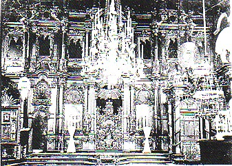 Внутренний интерьер Собора Николая Чудотворца в Зарайске, начало XX века